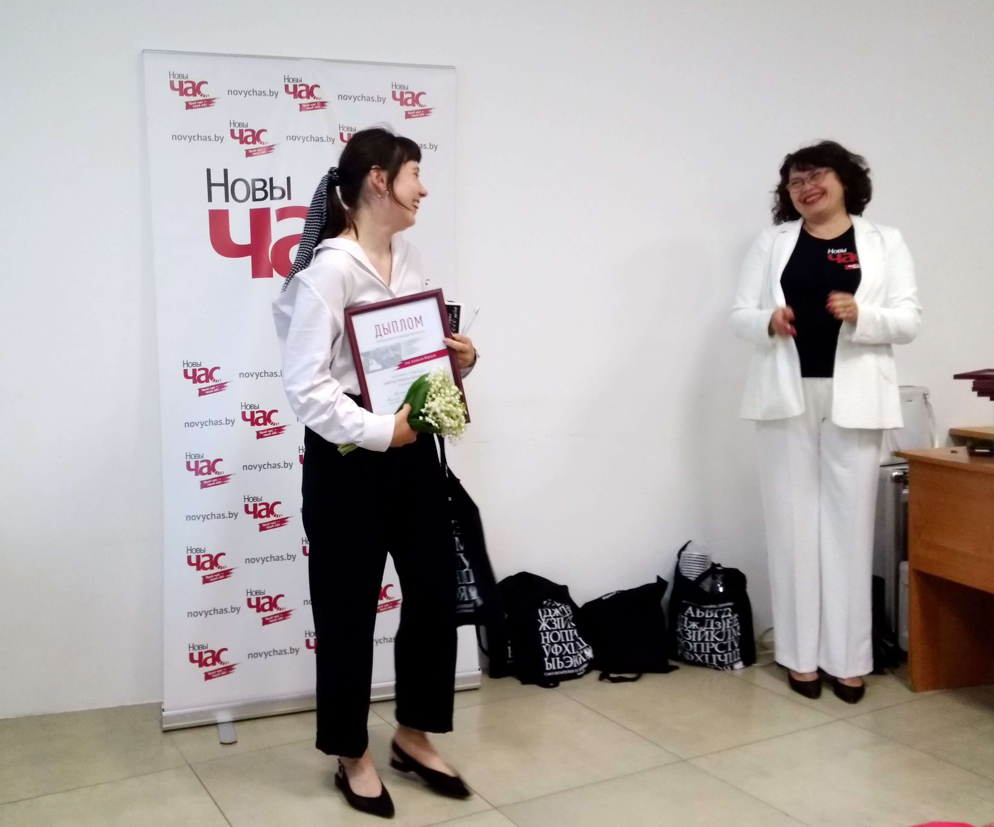 Дзіяна Пінчук. Узнагароджанне прэміяй імя Аляксея Караля ў намінацыі «Лепшы грамадска-палітычны матэрыял». Узнагароджвае гал. рэд. газеты «Новы Час» Аксана Колб. Мінск, 2019 г., офіс БАЖ (Беларуская асацыяцыя журналістаў).